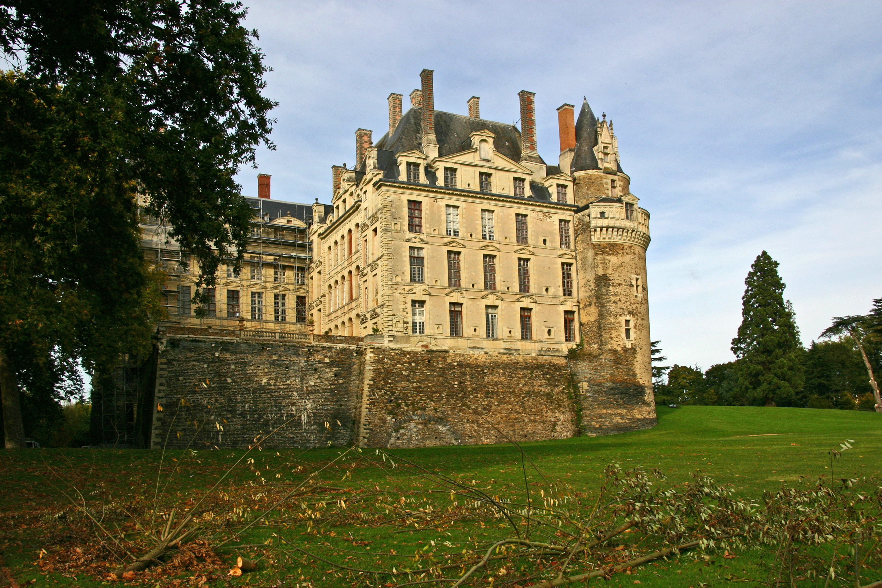 Schloss Brissac